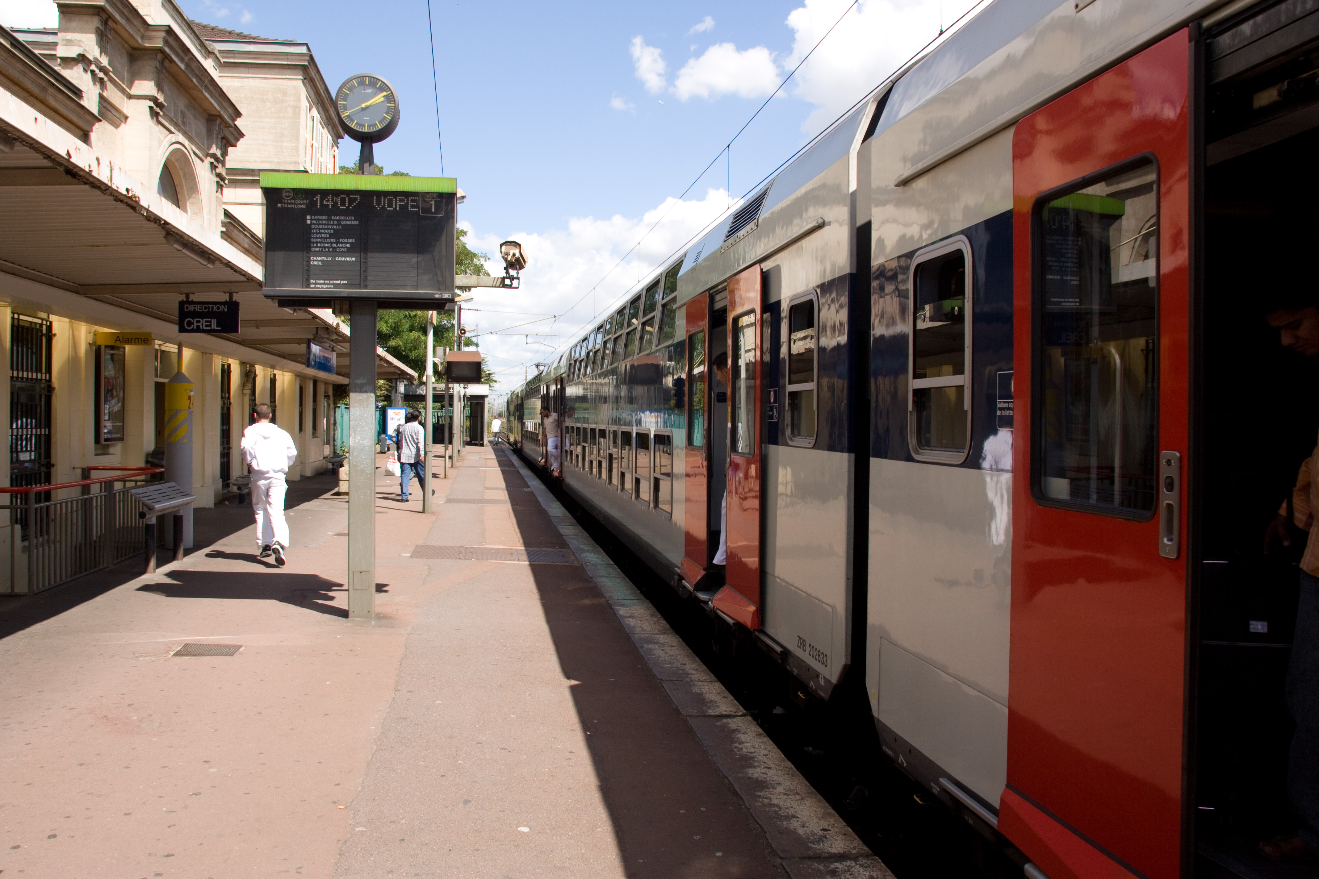 La Gare de Pierrefitte-Stains, département de Seine-Saint-Denis, France